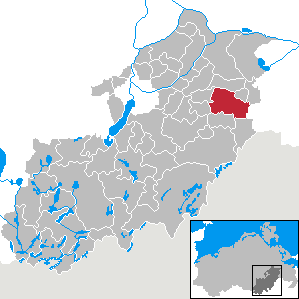 Groß Miltzow in Mecklenburg-Vorpommern, Landkreis Mecklenburg-Strelitz